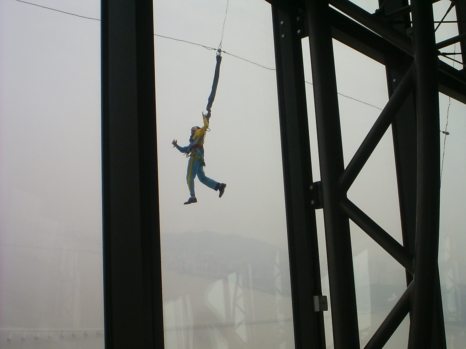 bungee jumping outside Macau Tower